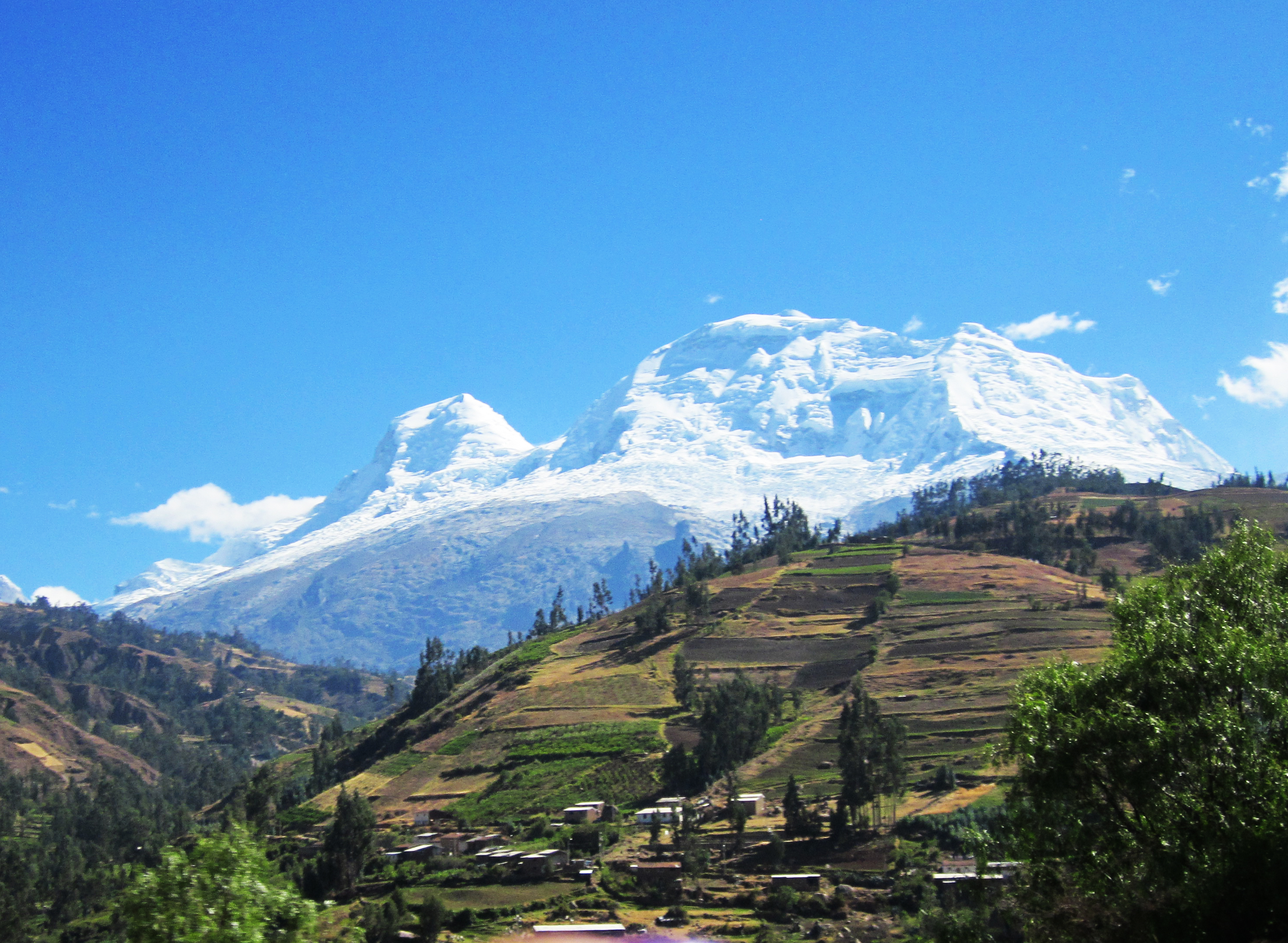 El Huascarán visto desde la Carretera Carhuaz - Chacas - San Luis (sector Shilla).